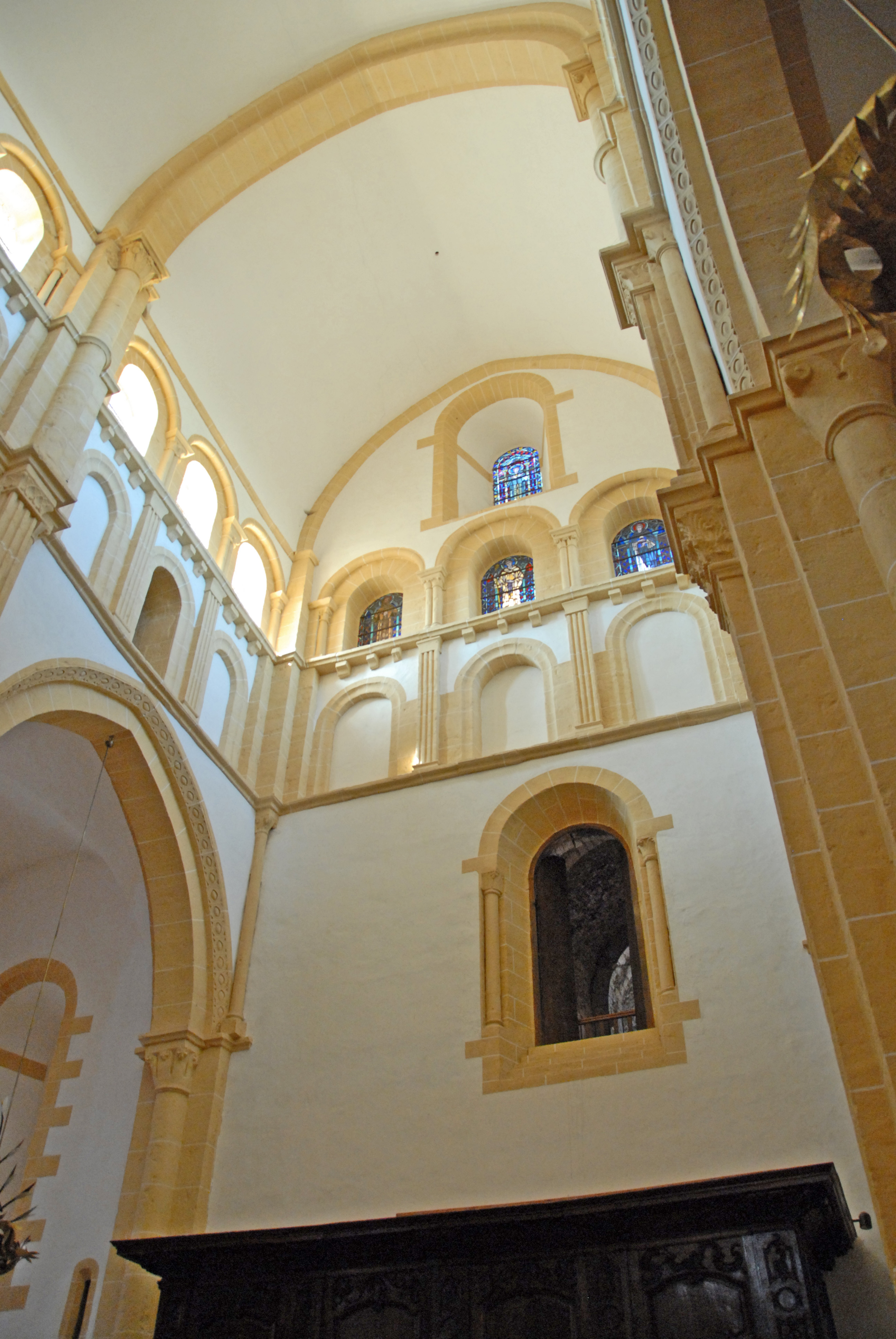 Mittelschiff Joch 1